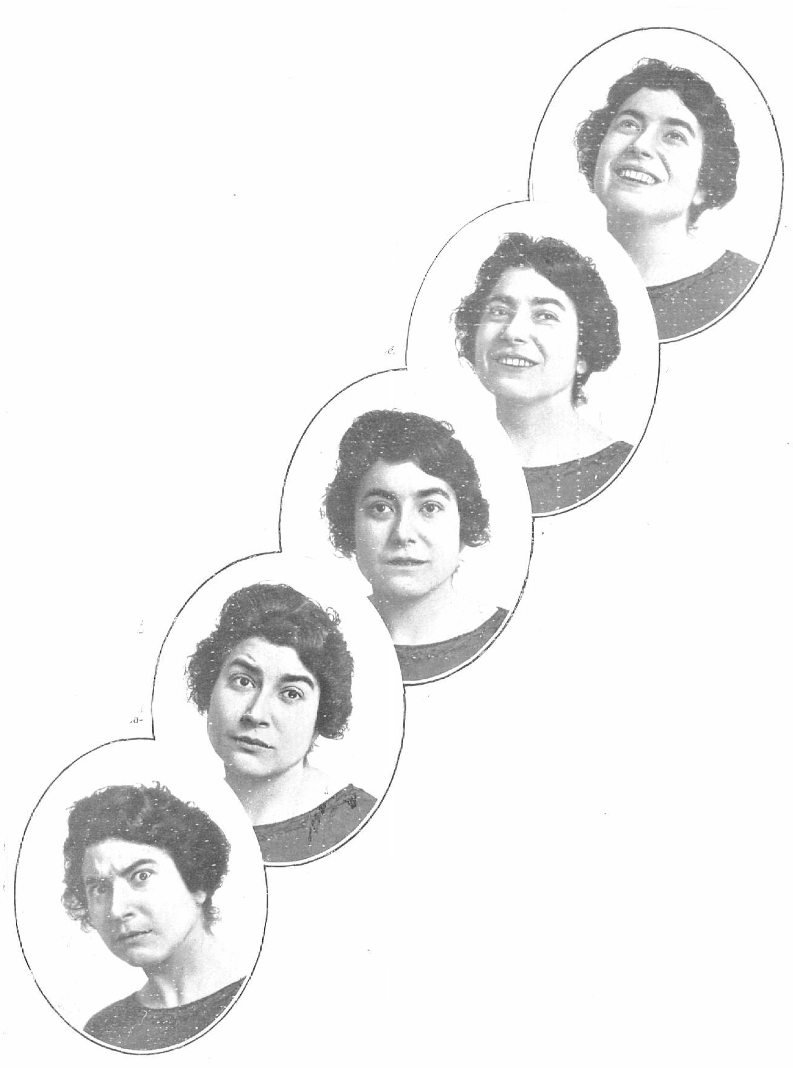 Estudios fisonómicos de Margarita Xirgu.